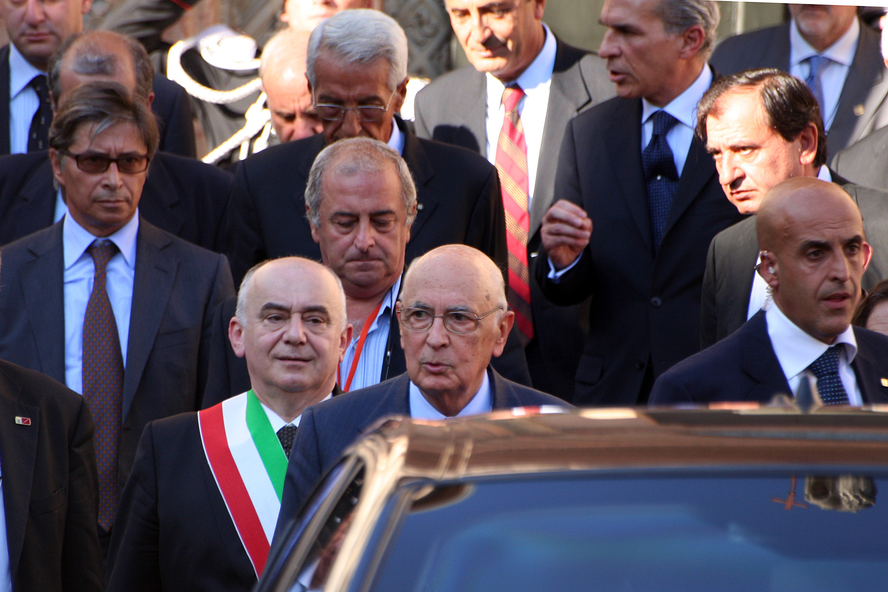 Modena - La morte di Pavarotti